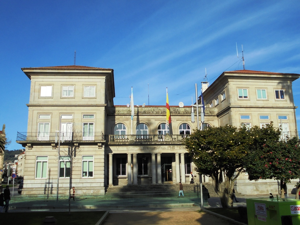 Subdelegación del Gobierno en Pontevedra Capital